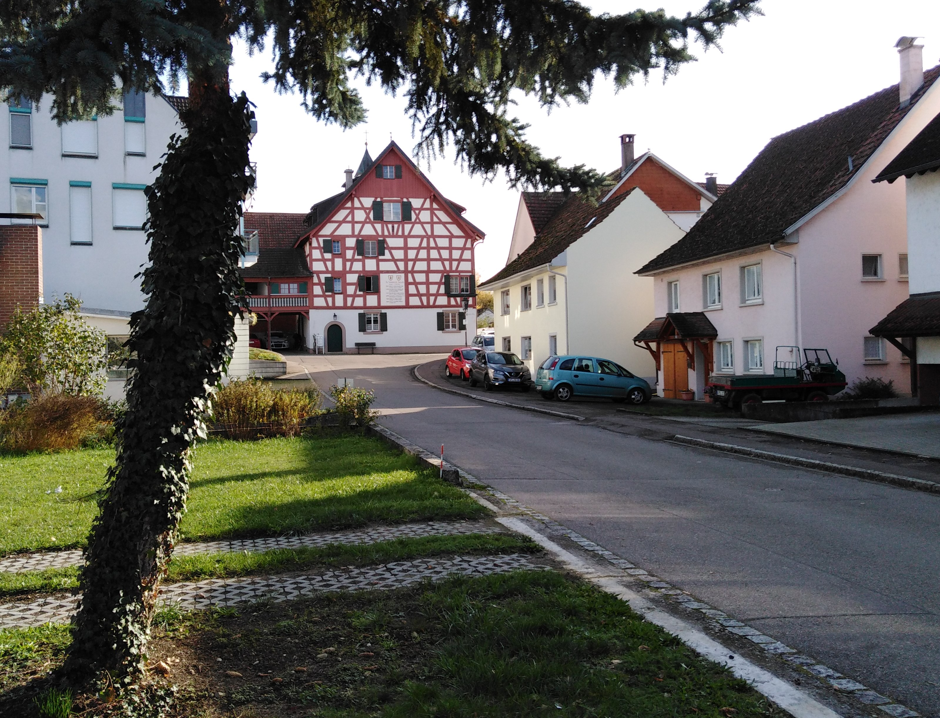 Ortschaft Kadelburg, Ortsteil der Gemeinde Küssaberg im Landkreis Waldshut in Baden-Württemberg. Straßenzug mit Blick zum historischen Kelnhaus.